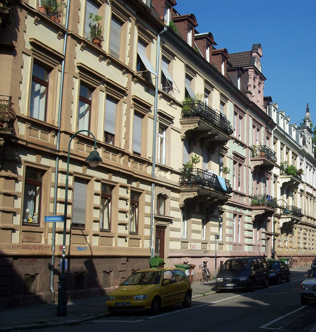 von Autor Chalco am 30. August 2005 fotografiert, Eine typische Straße im Stadtteil Wiehre, Freiburg im Breisgau